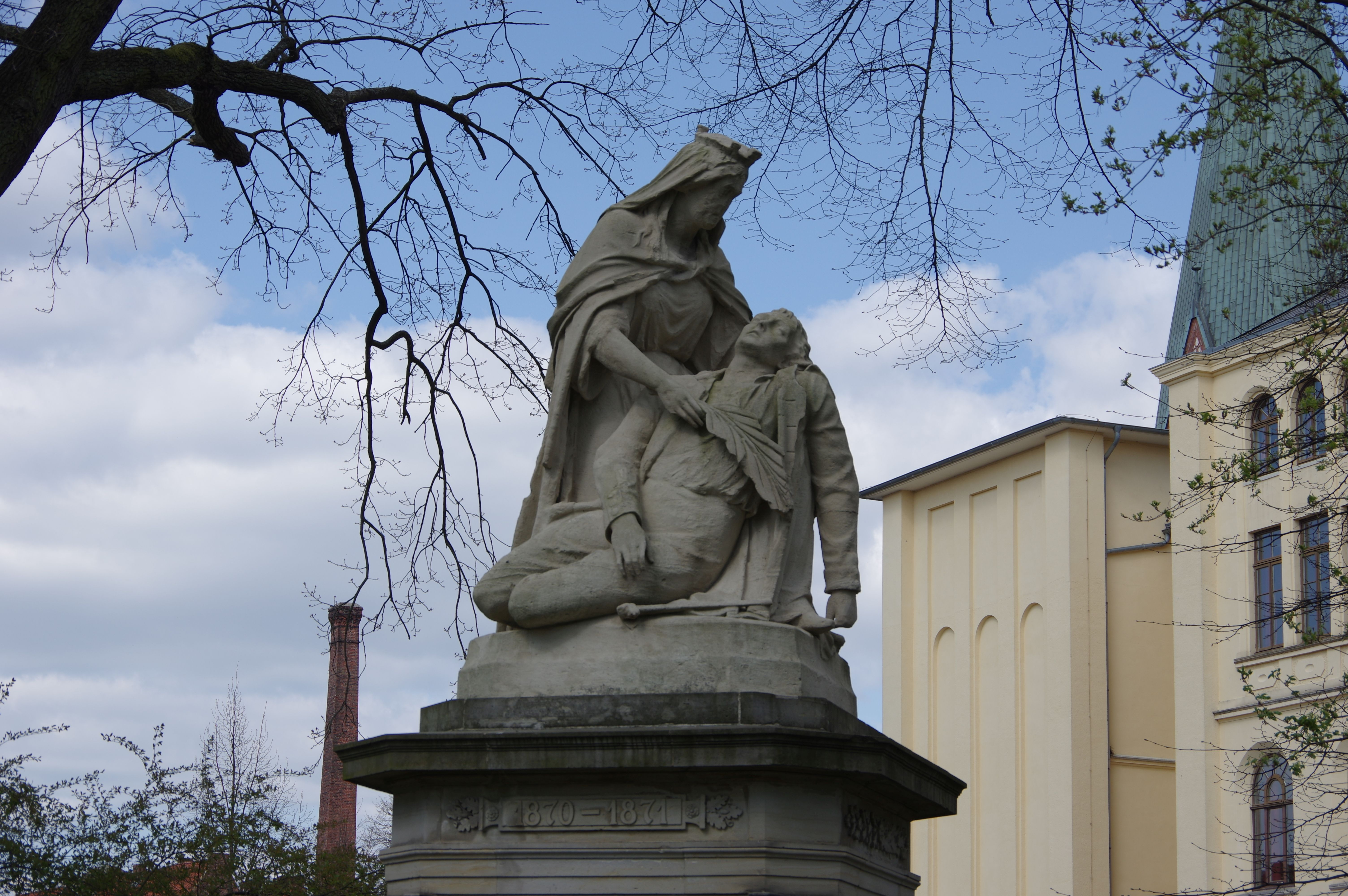 Lüneburg in Niedersachsen. Der Clamart-Park ist ein Park südöstlich der Lüneburger Altstadt. Der Park wurde nach der französischen Partnerstadt Clamart benannt.